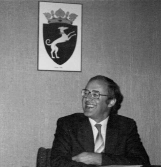 Burgemeester Spijkerboer onder het Wapen van de gemeente Gieten (Dr.)